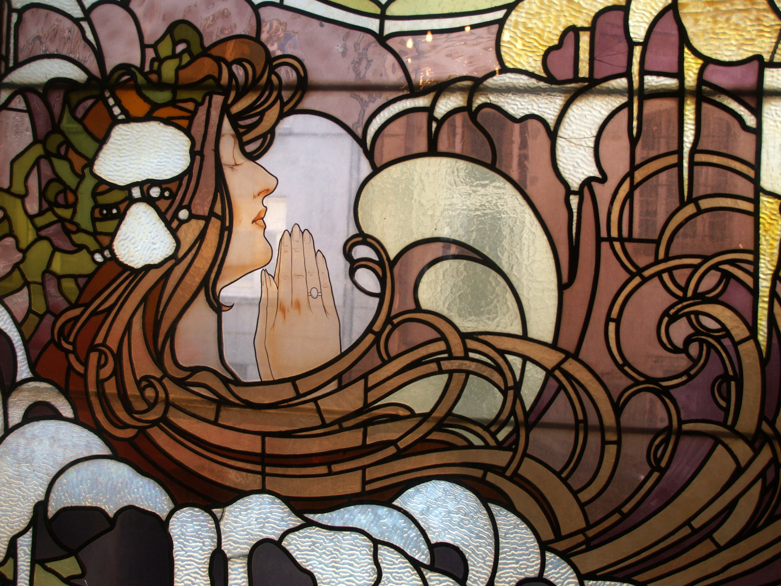 Détail du vitrail de l'Hôtel Saintenoy, rue de l'Arbre Bénit 123, Ixelles (Bruxelles), Belgique)